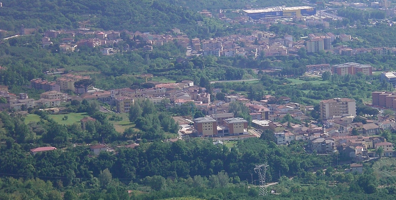 Veduta di Fisciano da San Michele di Basso